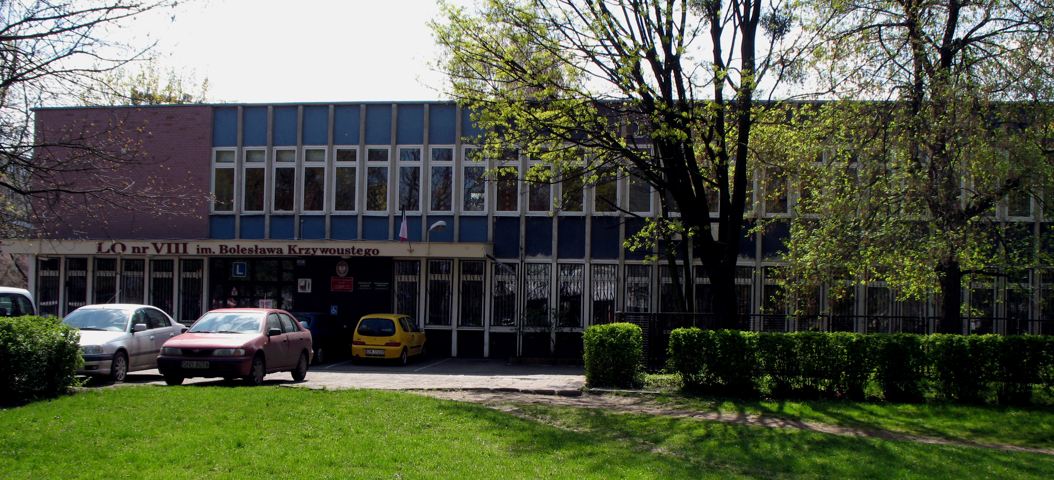 Wrocław, liceum ogólnokształcące nr VIII, ul. Zaporoska 71